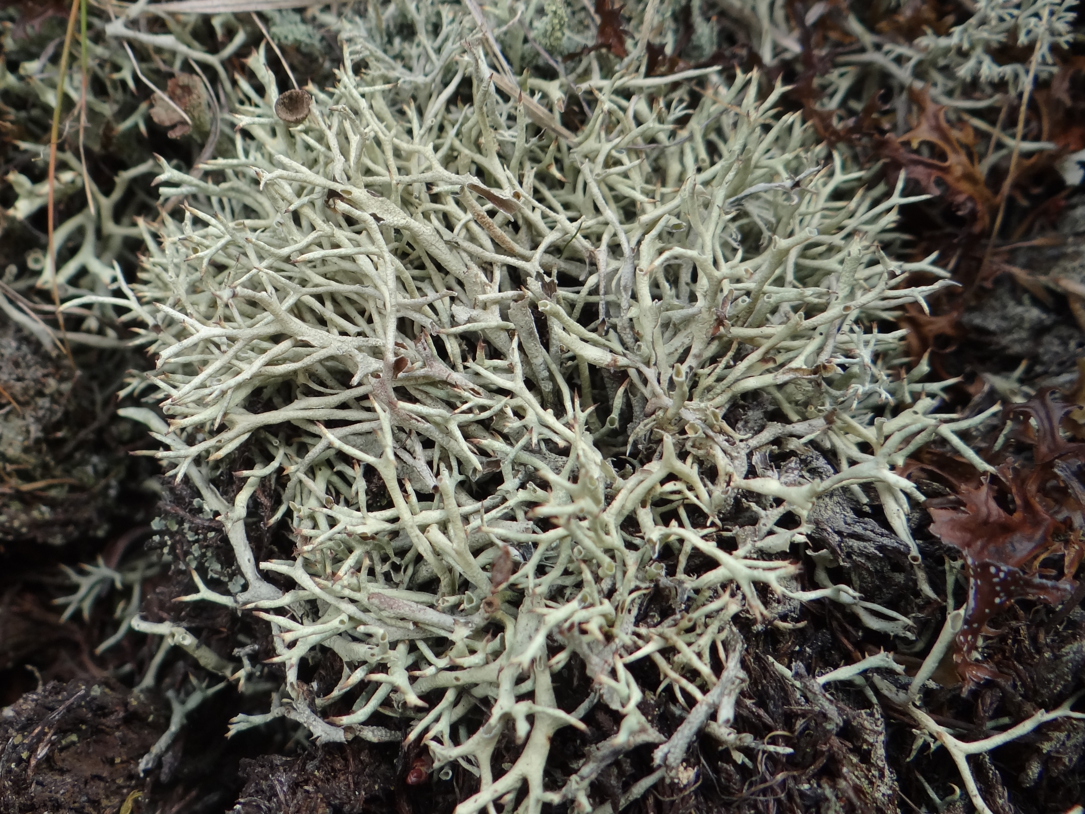 Cladonia uncialis (location:Poland, Babia Góra, Kościółki)